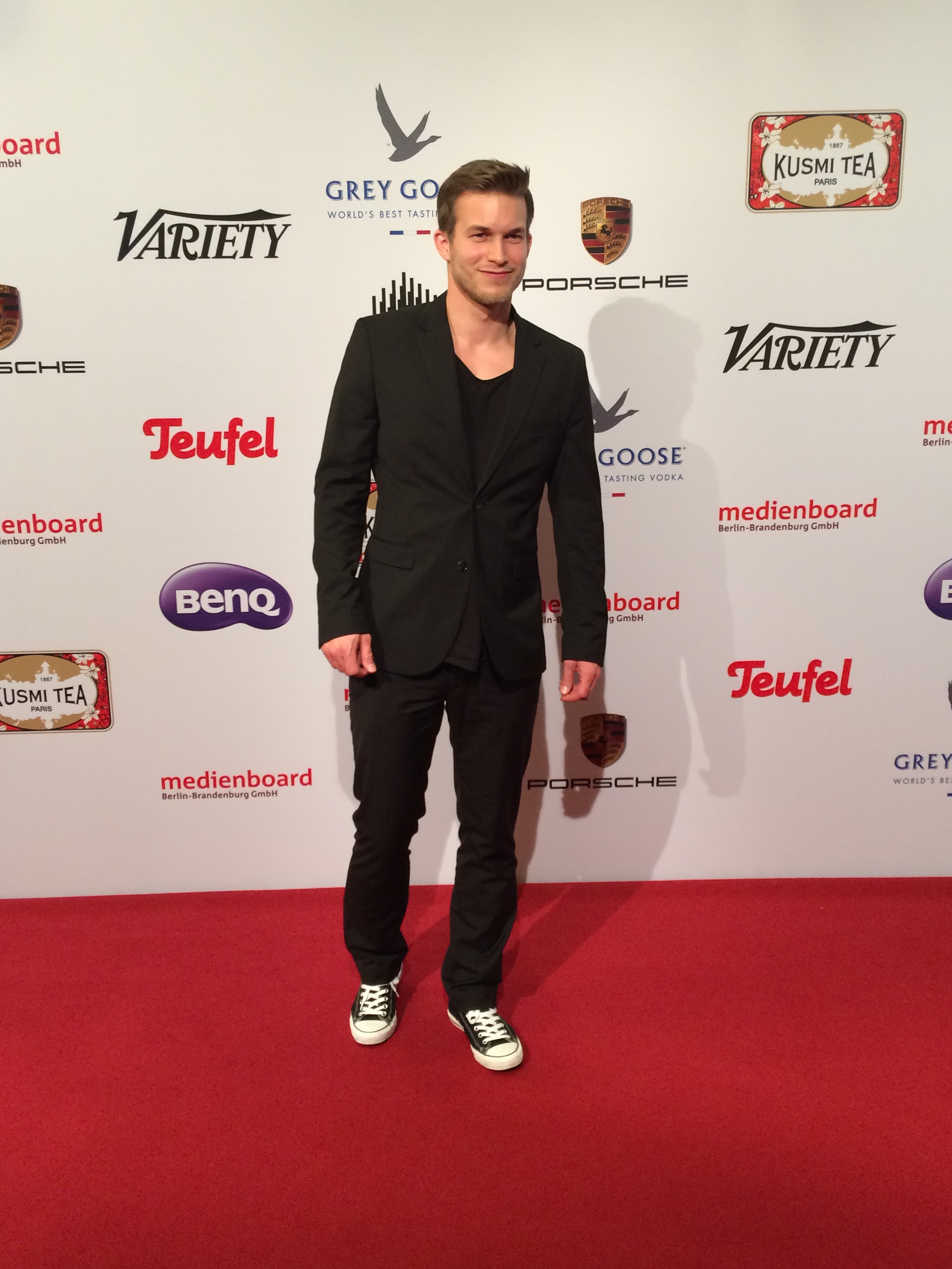 Forian Frowein 2015